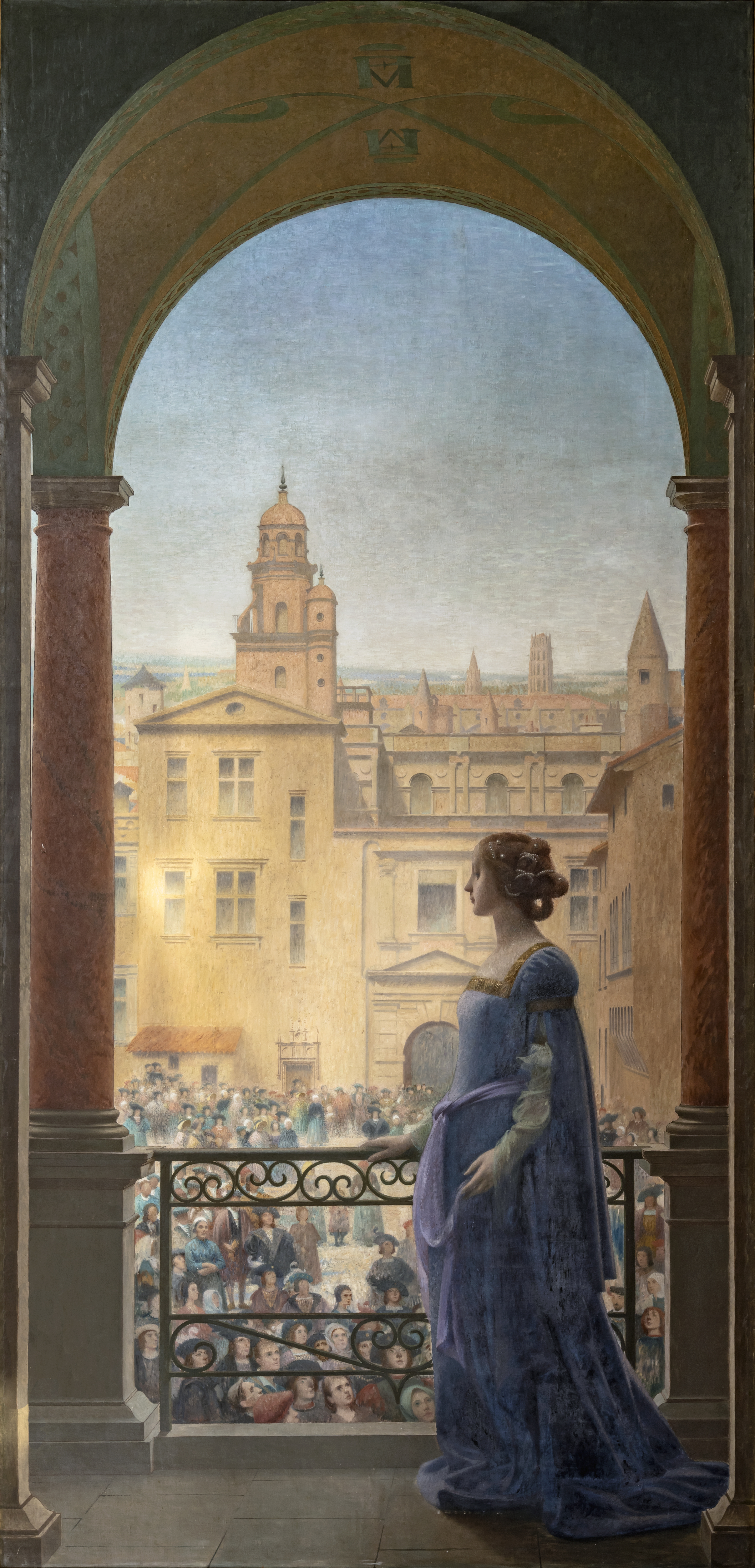 Depicted person: Paule de Viguier – French poet